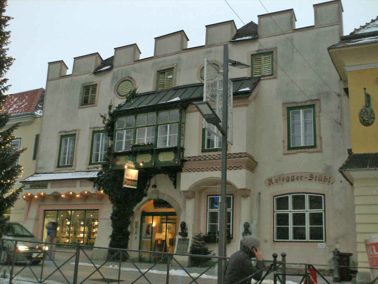 Gebäude der Alten Ratsburg in Mürzzuschlag.